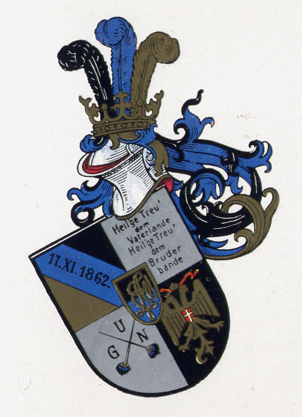 Studentenwappen des Corps Alemannia Wien